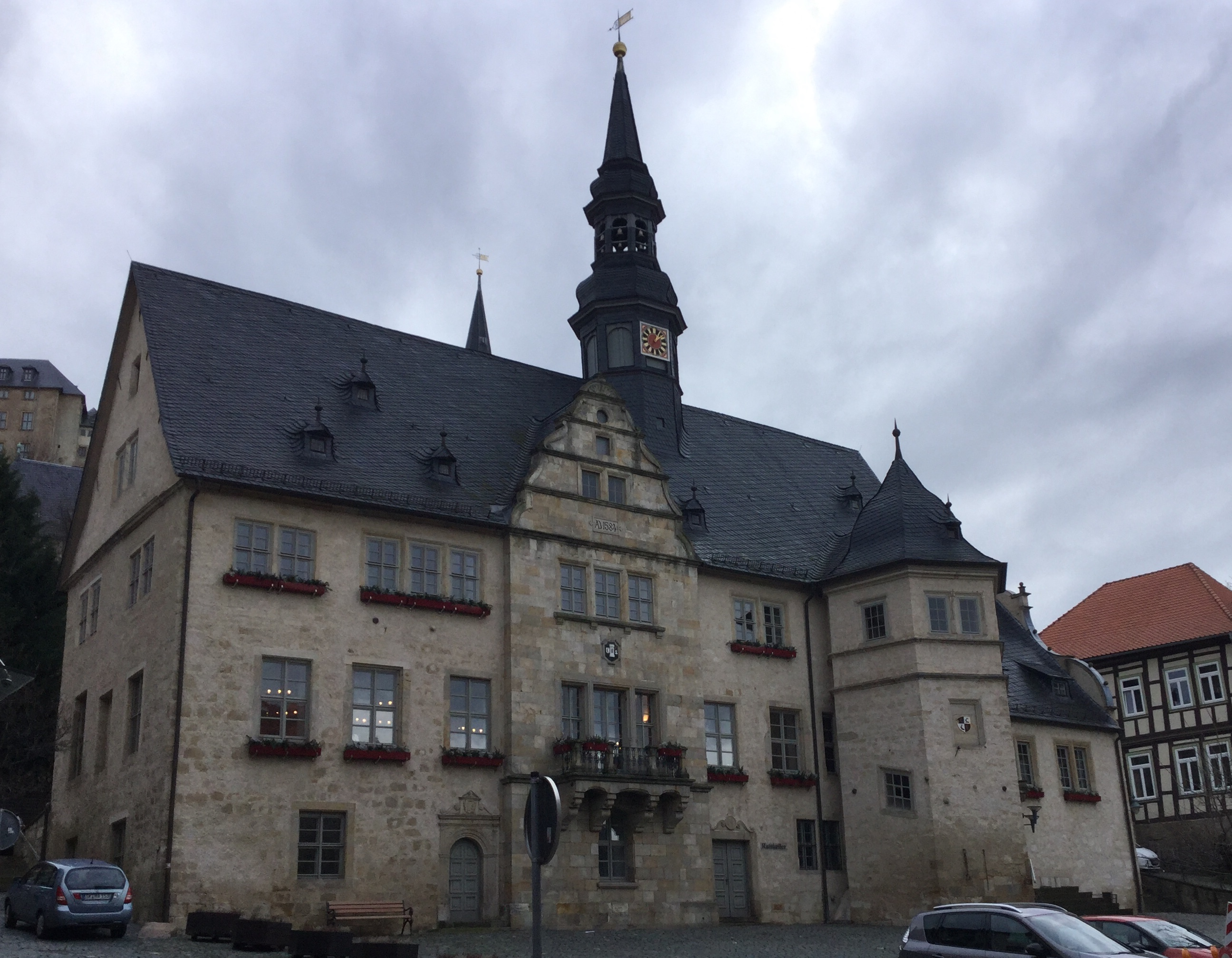 Rathaus Blankenburg